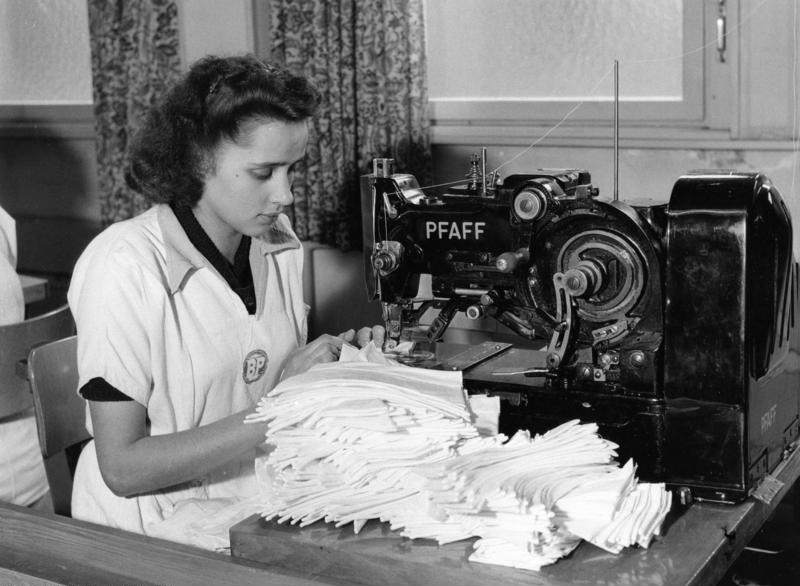 30.11.1953 Köln Textilfabrik Bierbaum-Proenen Diese Knopflochmaschine arbeitet Kragenknopflöcher. Außer ihr gibt es die Zwilling-Knopflochmaschine, der es obliegt, zwei aufeinandergehörige Knopflöcher z.B. an der Manschette, völlig gleich und mikroskopisch genau einzupassen.